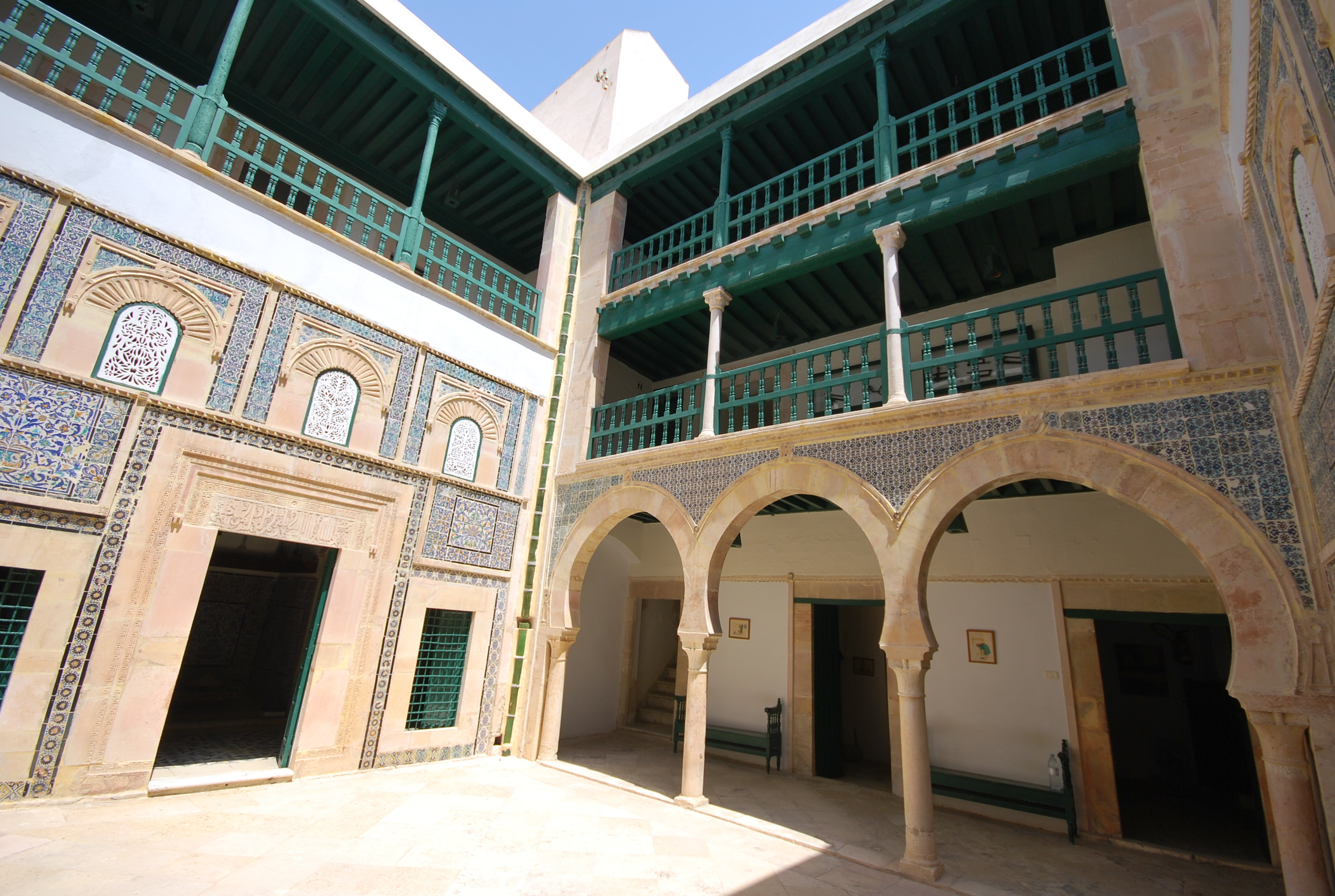 Patio du musée Dar Jallouli à Sfax